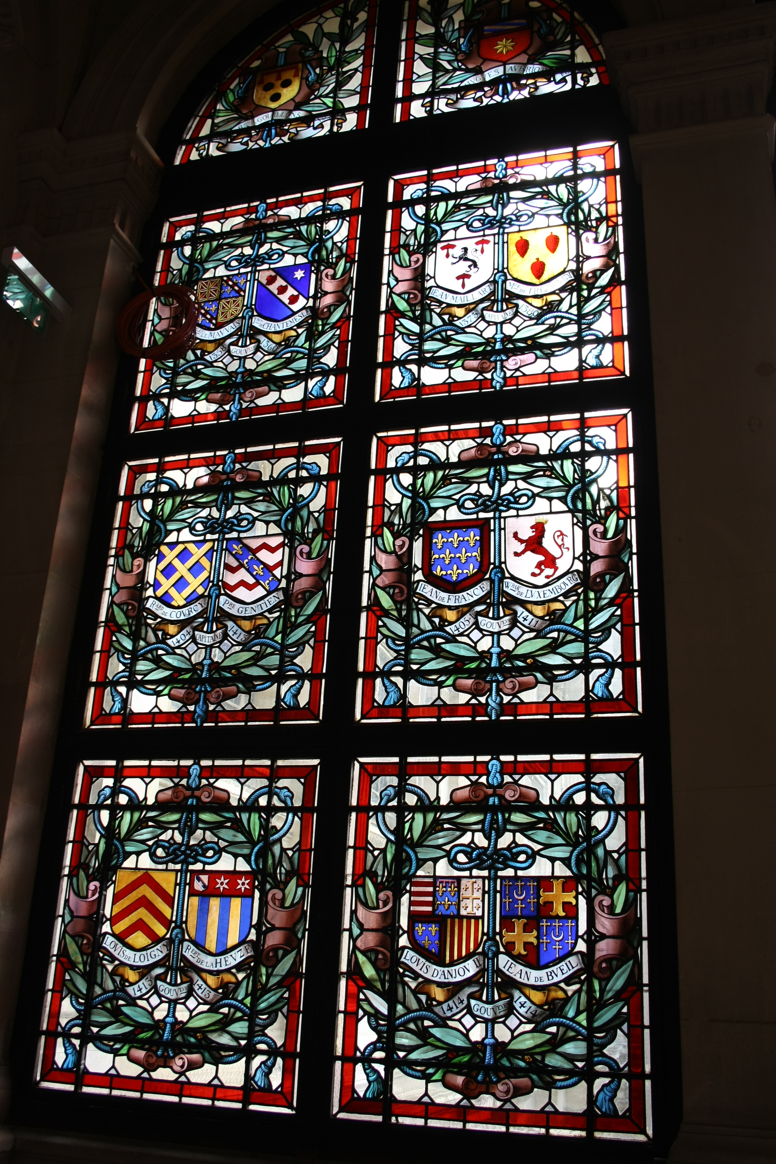 Bleiglasfenster im Rathaus von Paris (4. Arrondissement), "galerie du conseil", Darstellung: Wappen der Prévôt des marchands de Paris